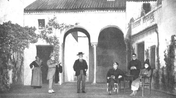 Escena de la obra de teatro La calumniada, de los Hermanos Álvarez Quintero